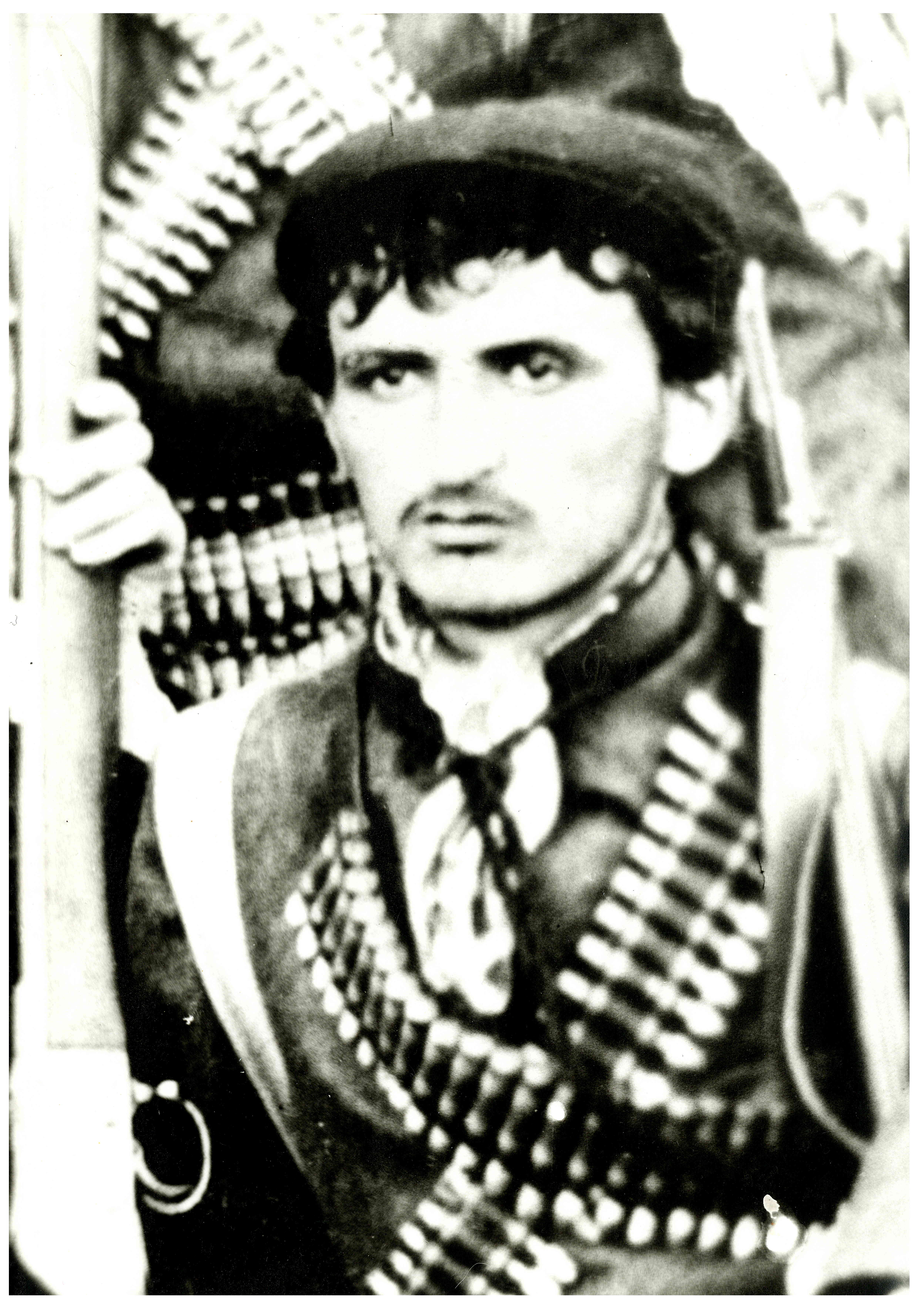 Анастас Разбойников преди обявяване ва Илинденско-Преображенското въстание